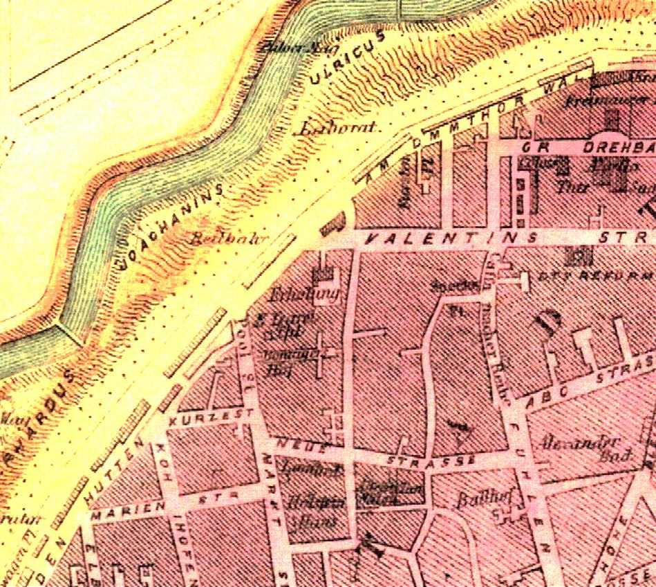 Dies ist der Teil einer Karte von Hamburg von ca 1880. Dieser Teil zeigt die nördliche Nordstadt.